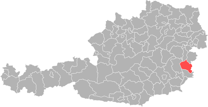 Bezirk Oberwart in Österreich